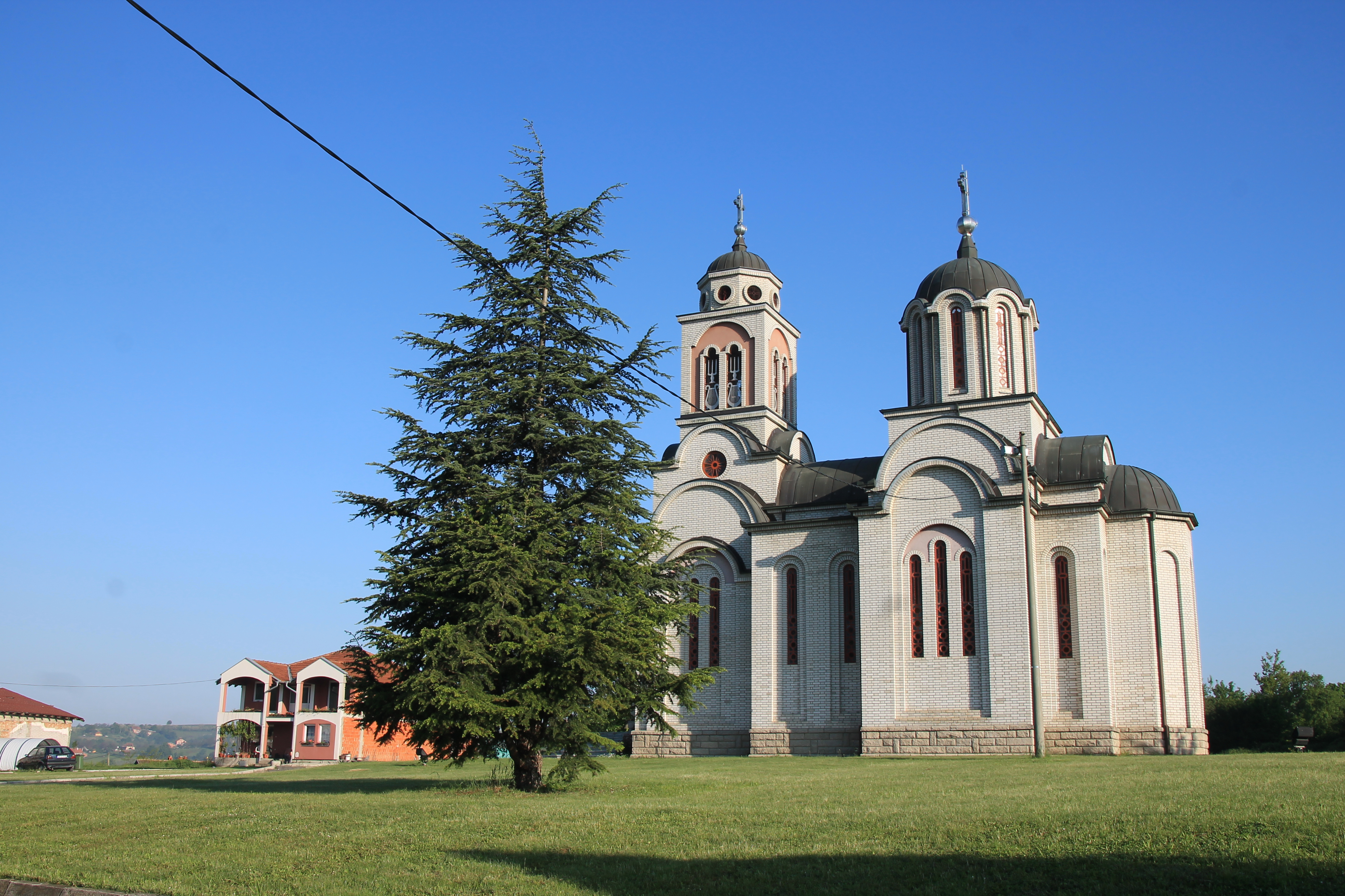 Crkva Sv. Simeona Monaha (Darosava)